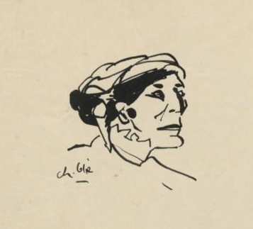 Catherine Fonteney dans "Vautrin" à la Comédie Française : caricature